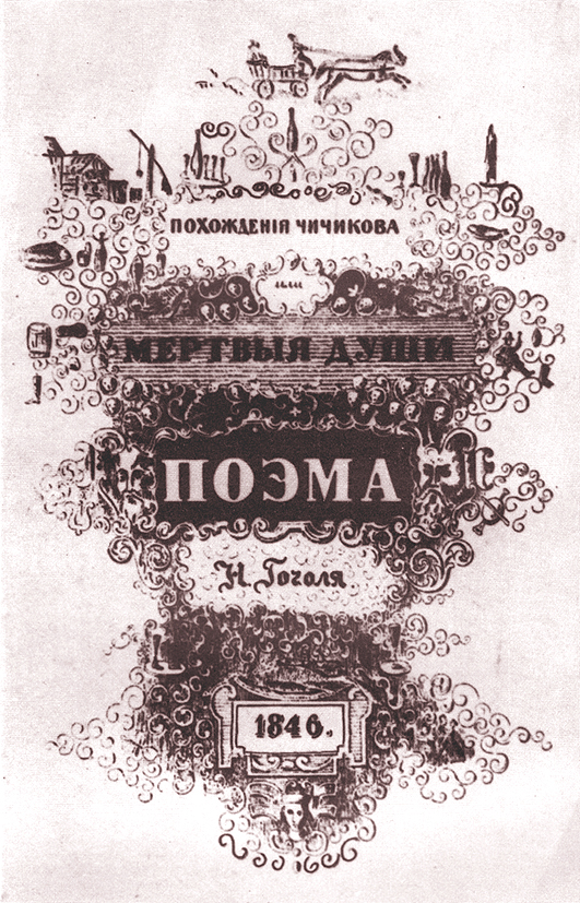 Титульный лист "Мёртвых душ"